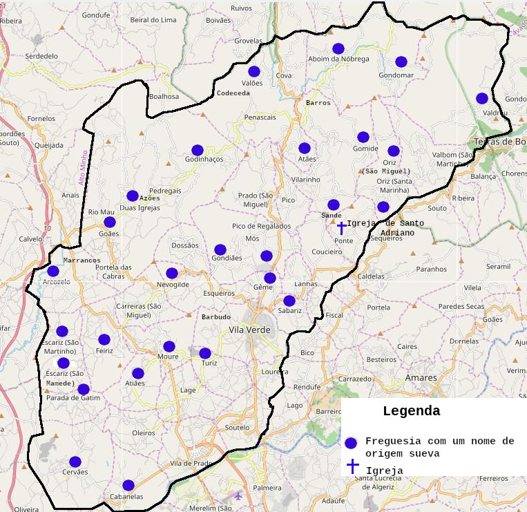 Mapa das freguesias do concelho de Vila Verde com um nome de origem sueva.